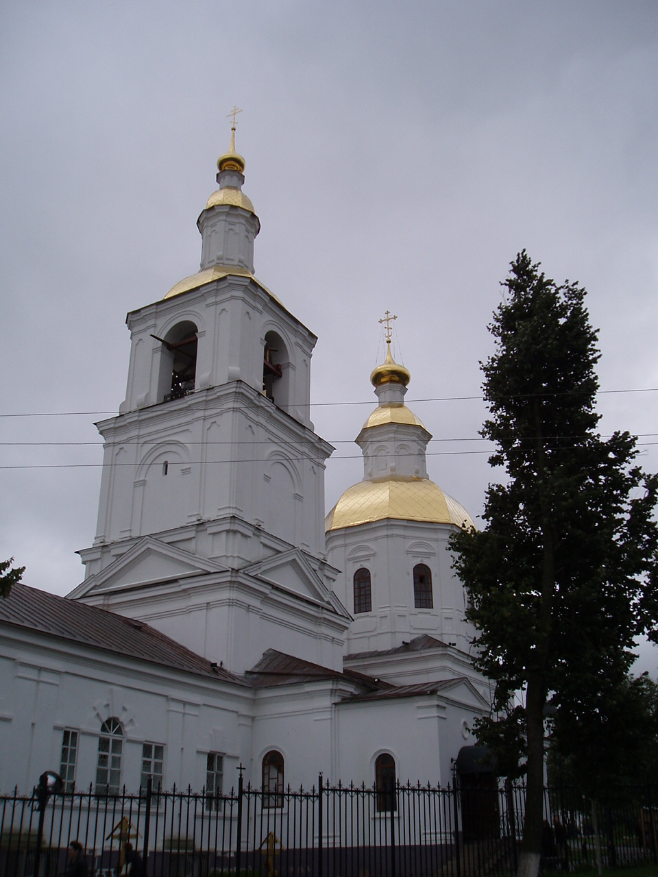 Церкви Рождества Христова, Рождества Богородицы и Казанской иконы в Дивеевском монастыре